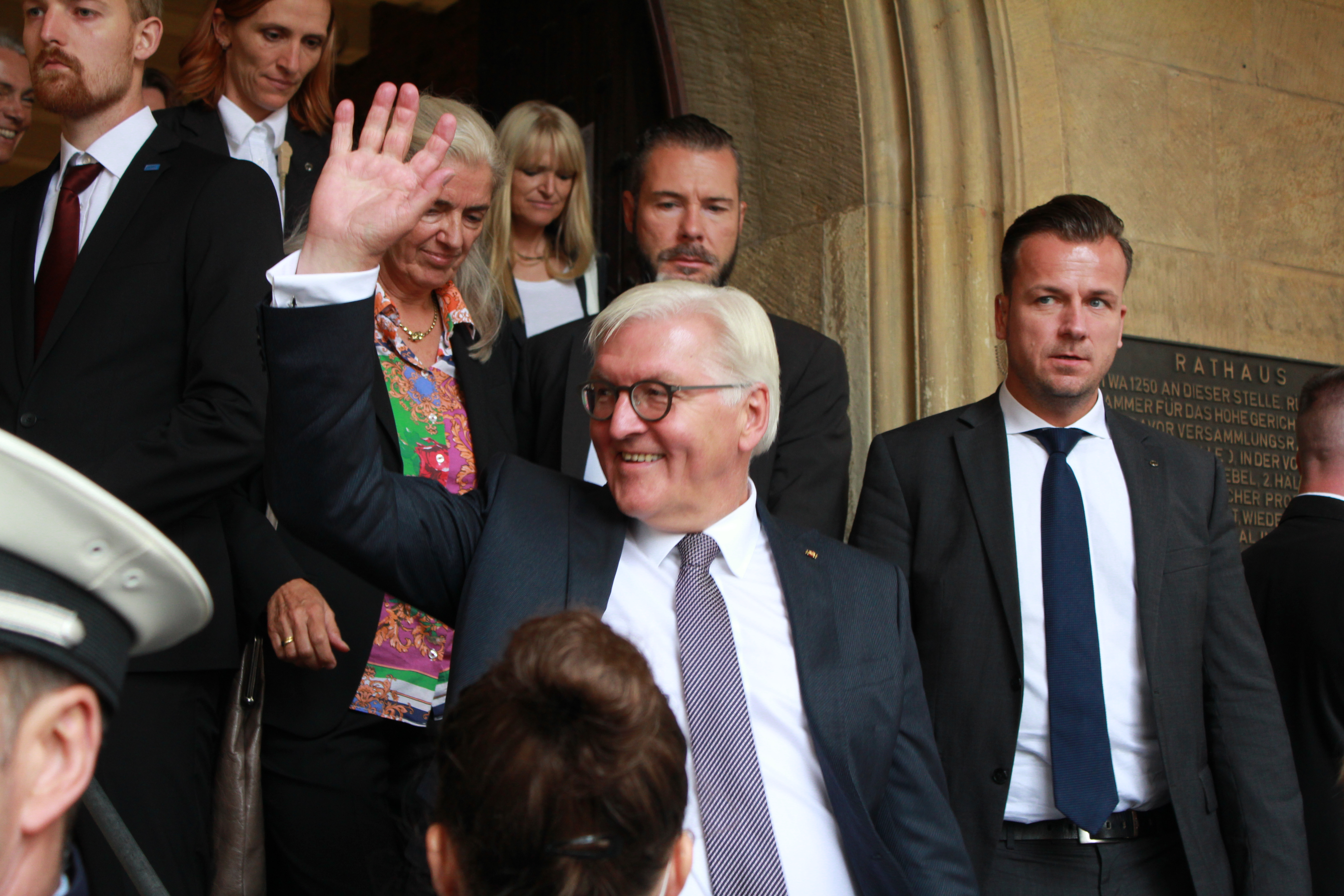 Am 31. August 2017 besuchte Bundespräsident Frank-Walter Steinmeier Münster, um die "Skulptur Projekte 2017" zu sehen. Einem Rundgang zu den in der Stadt verteilten Skulpturen folgte ein Empfang im Friedenssaal. Hier: Im Anschluss an den Empfang im Friedenssaal verlässt Steinmeier das Historische Rathaus von Münster und grüßt davor wartende Bürger.